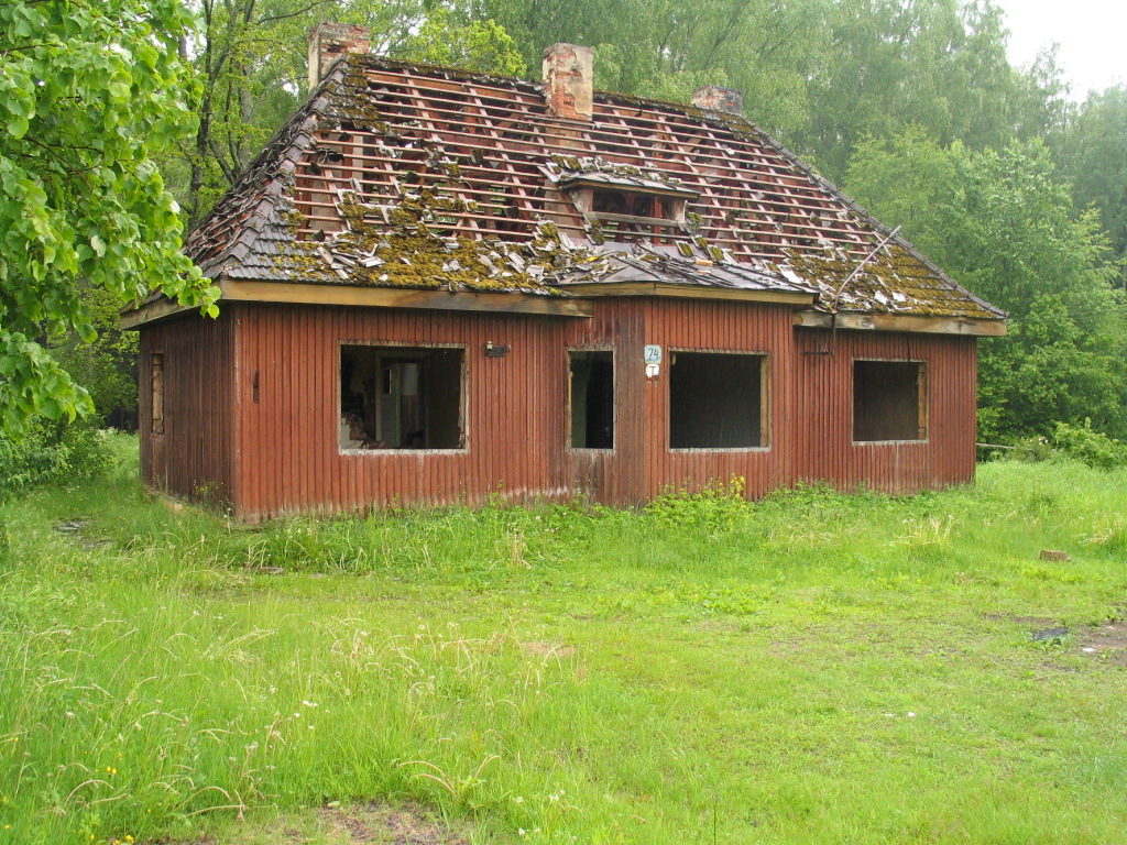 Laane jaamahoone varemed